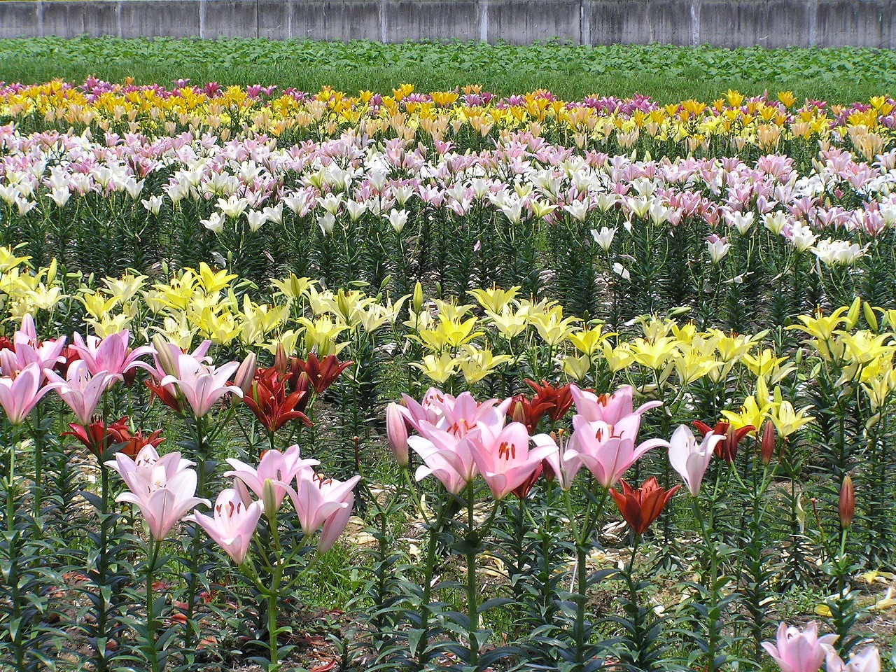 玉水ユリ園